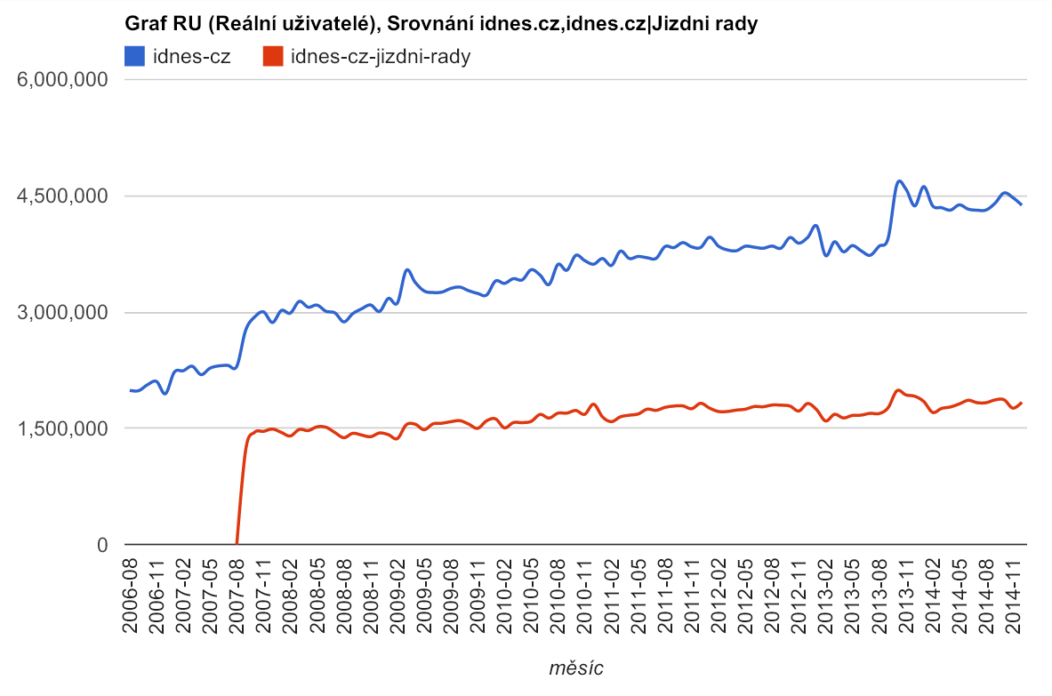 Idnes.cz a Jízdní řády - porovnání návštěvnosti